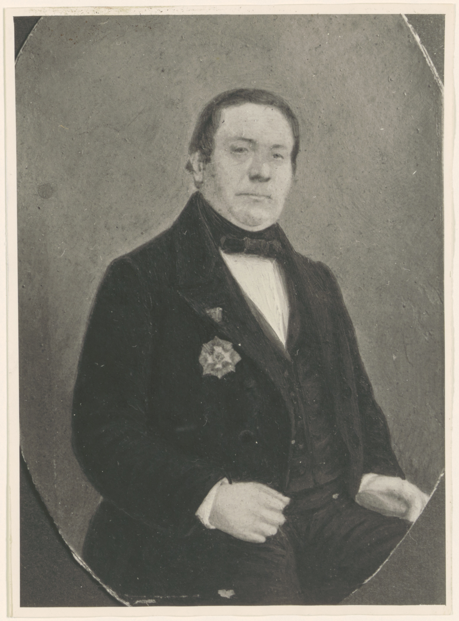 Mr. J.S. Lotsy. Geboren te Dordrecht 31 mei 1808, overleden te 's-Gravenhage 4 april 1863. Burgemeester van Dordrecht 1852 - 1856.